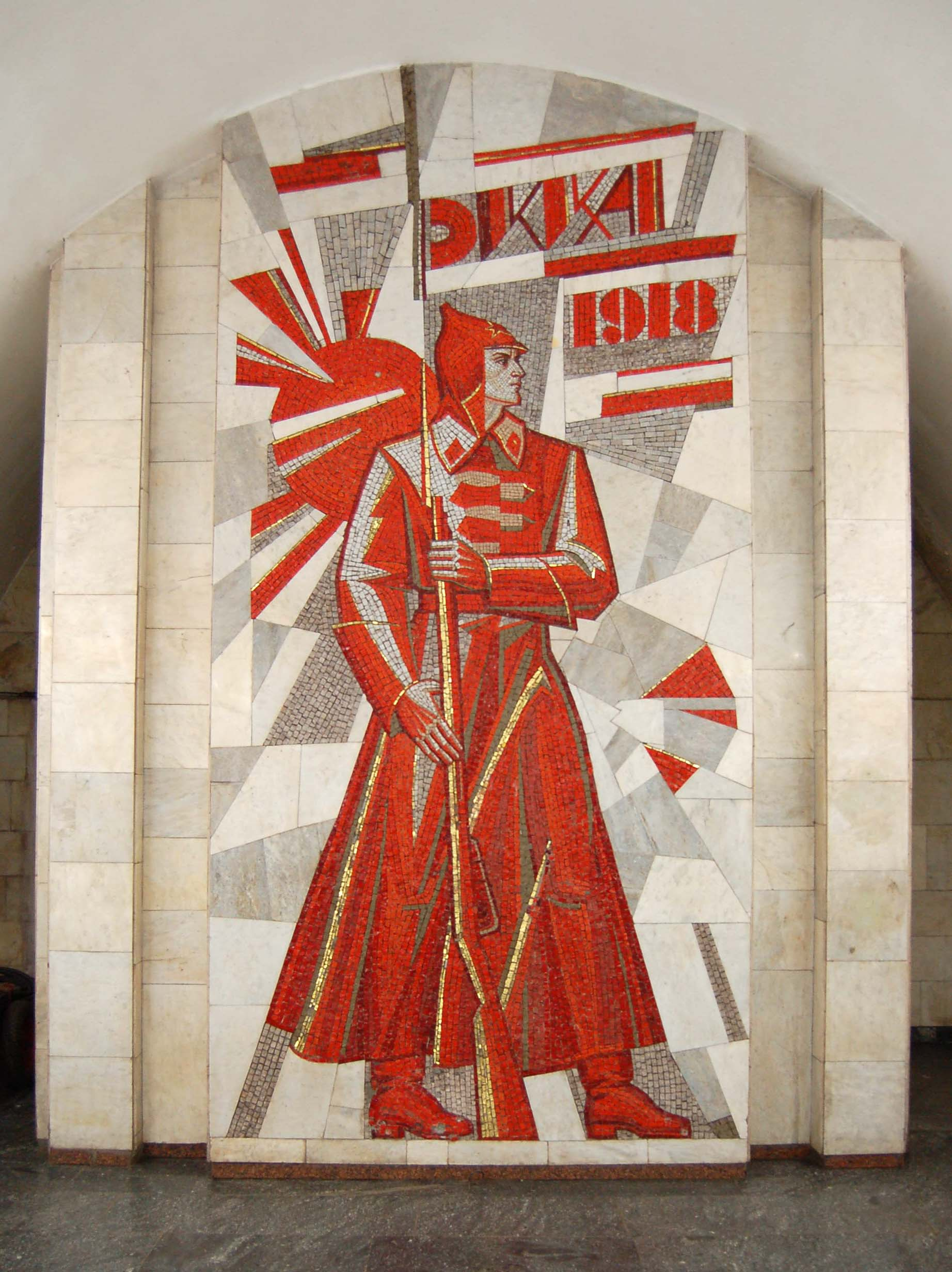 Станция метро «Дворец Украина», мозаика красноармейца в торце центрального зала